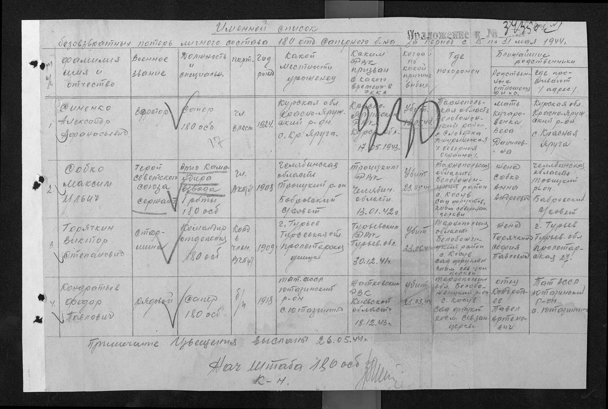 Герой Советского Союза